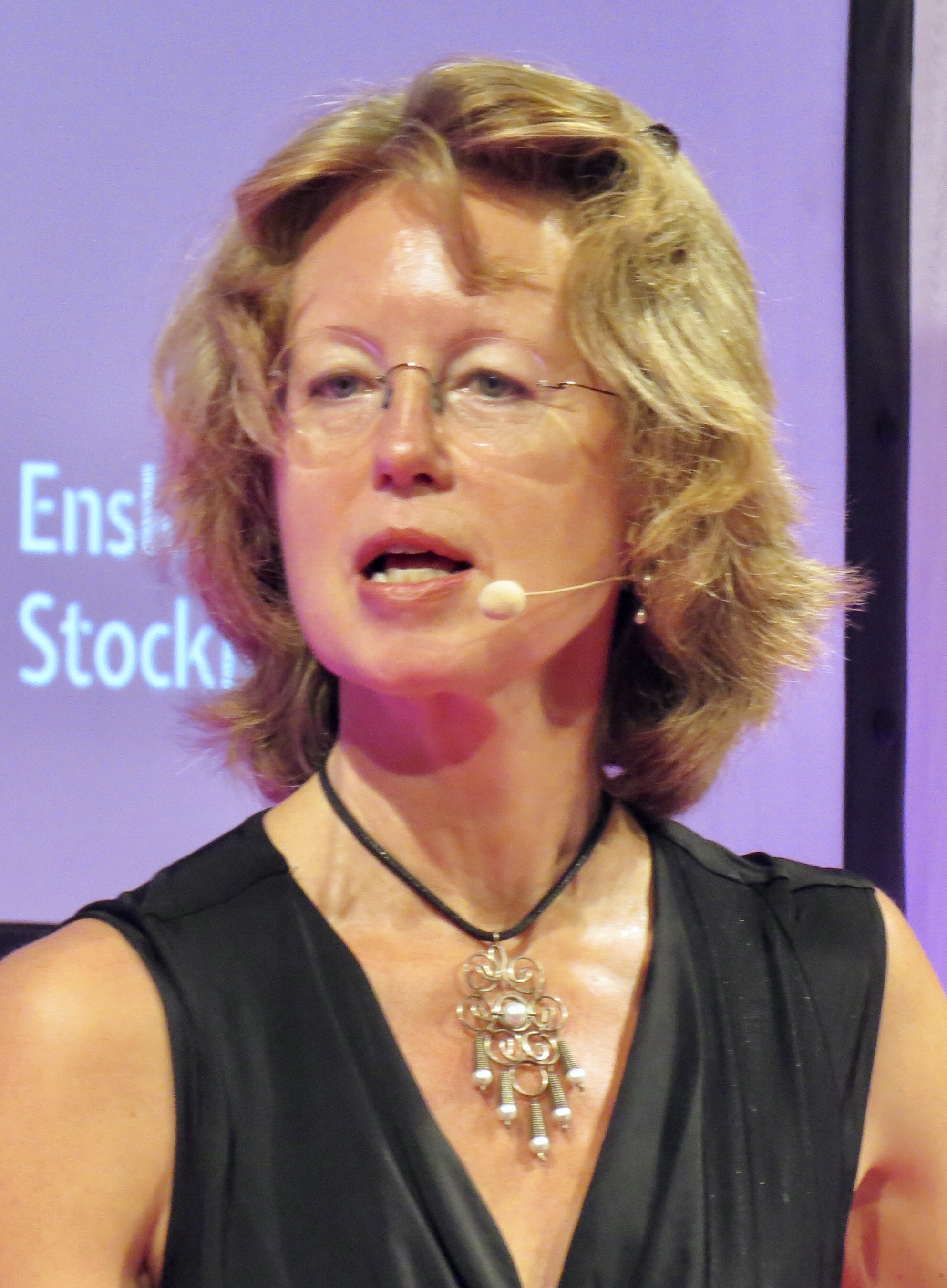 Susanne Wigorts Yngvesson, professor i etik vid Teologiska högskolan Stockholm.